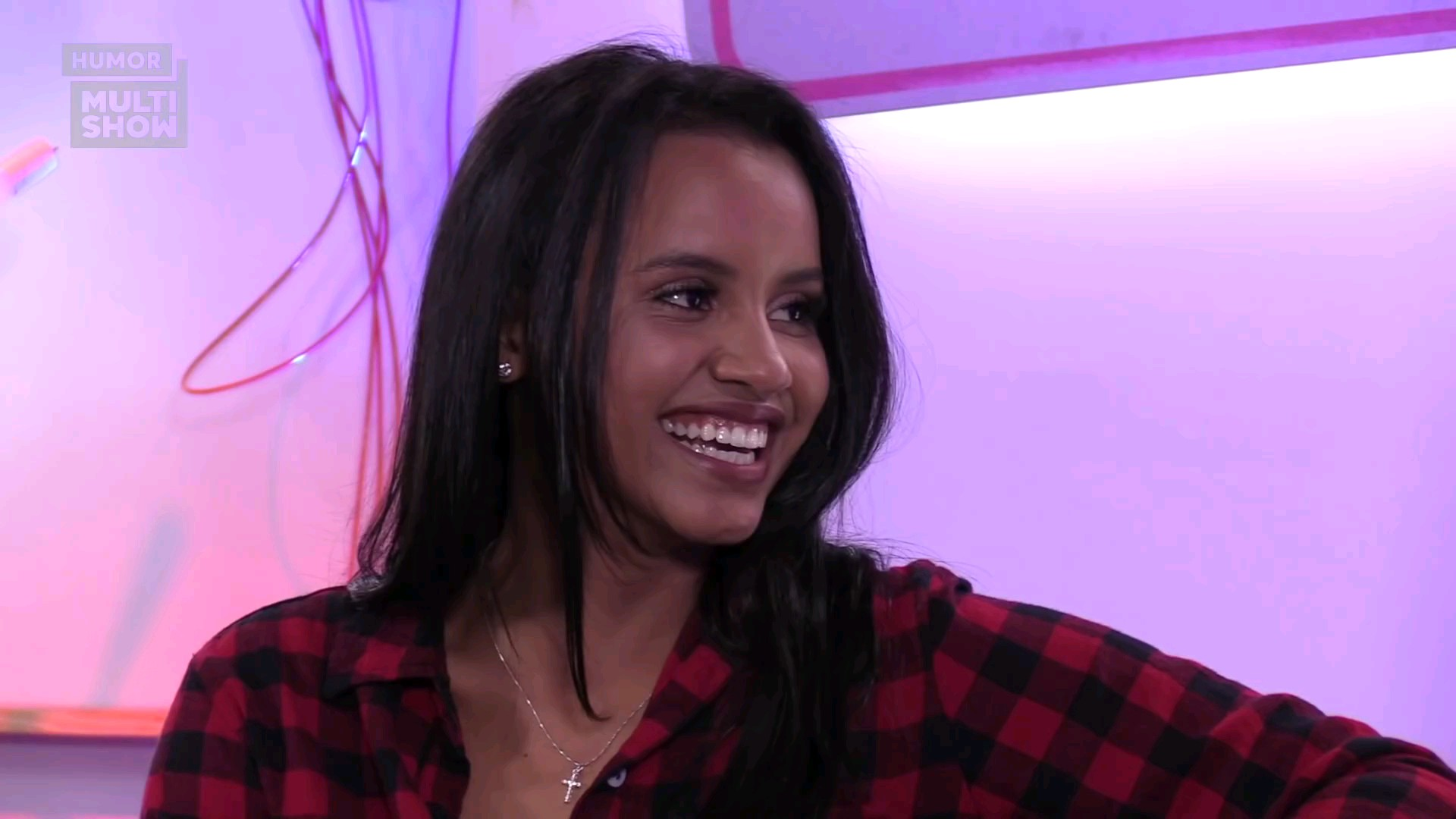 Gleici Damasceno durante entrevista para o canal Multishow